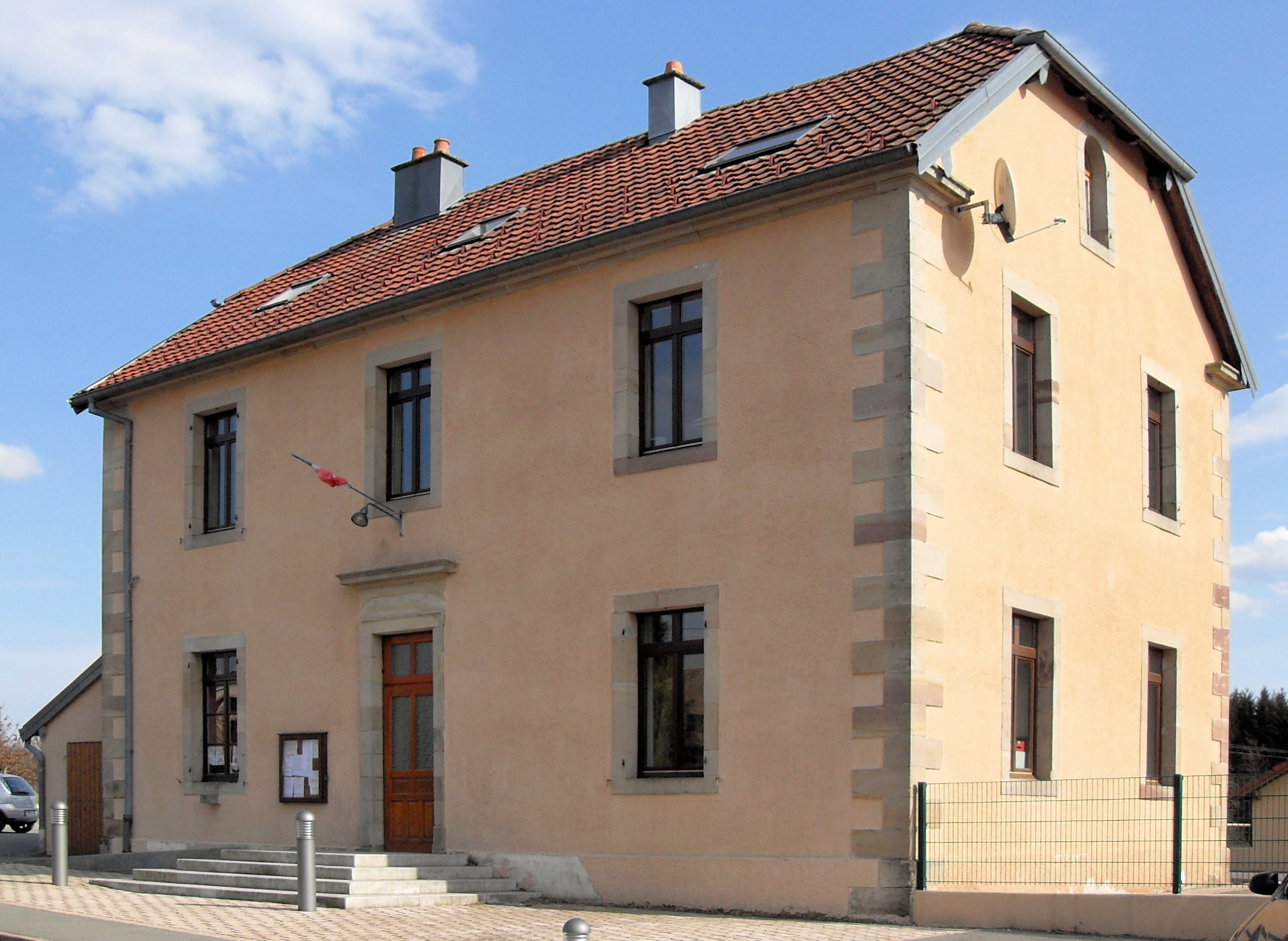 La mairie d'Errevet